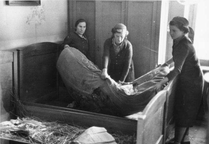 Adlershorst / Balten - Umsiedlung Baltenumsiedlung: Arbeitsmaiden des Reichsarbeitsdienstes säubern verlassene polnische Wohnungen, welche für Baltendeutsche bestimmt sind. 1939